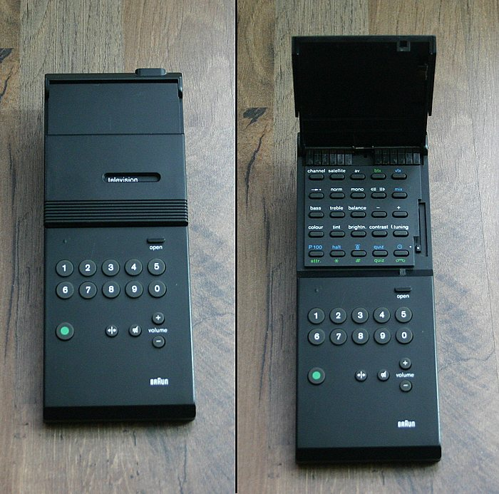 Fernbedienung Braun Atelier Anlage (Image).